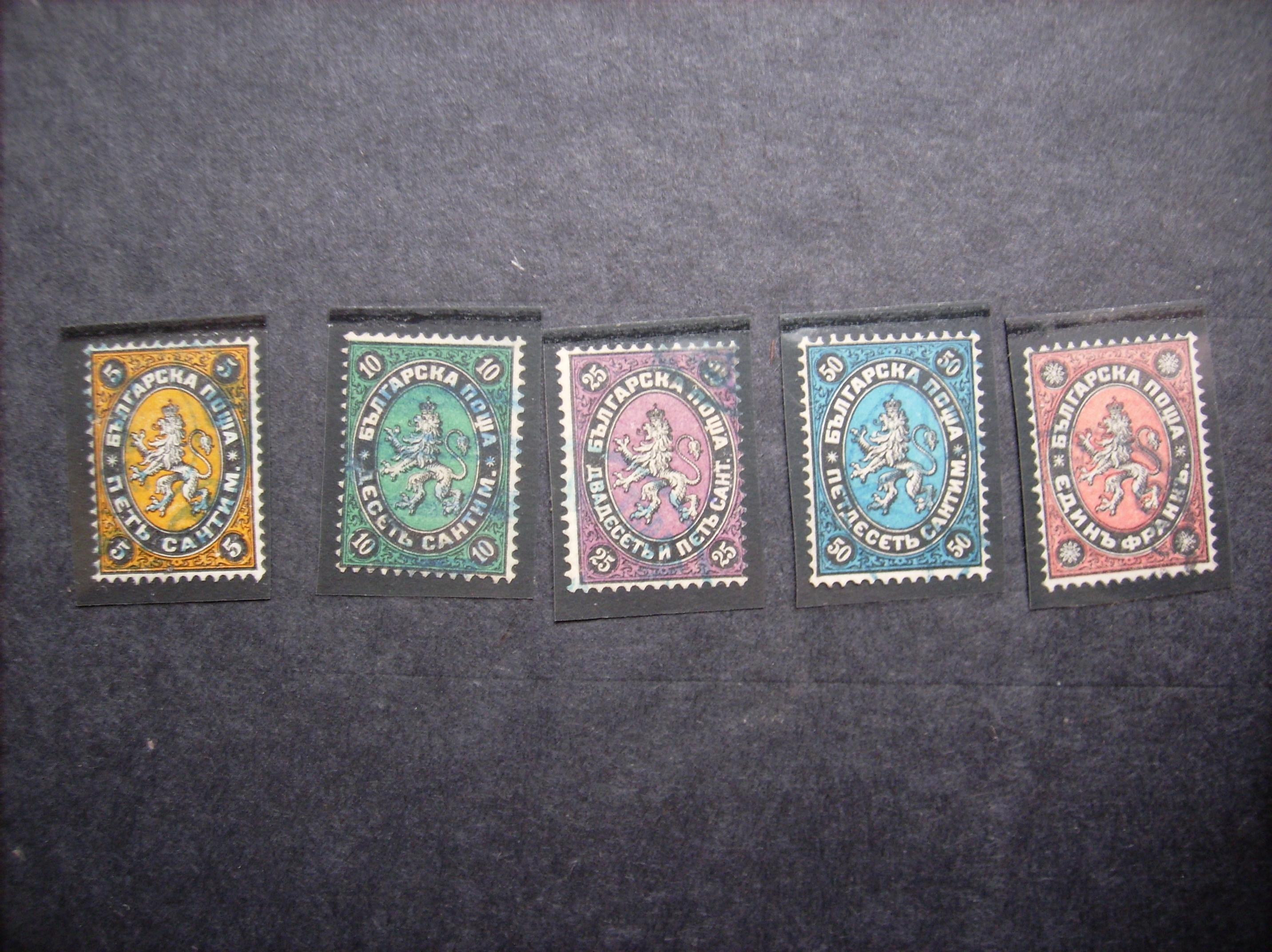 Първите български пощенски марки, пуснати в обръщение на 1 май 1879 година